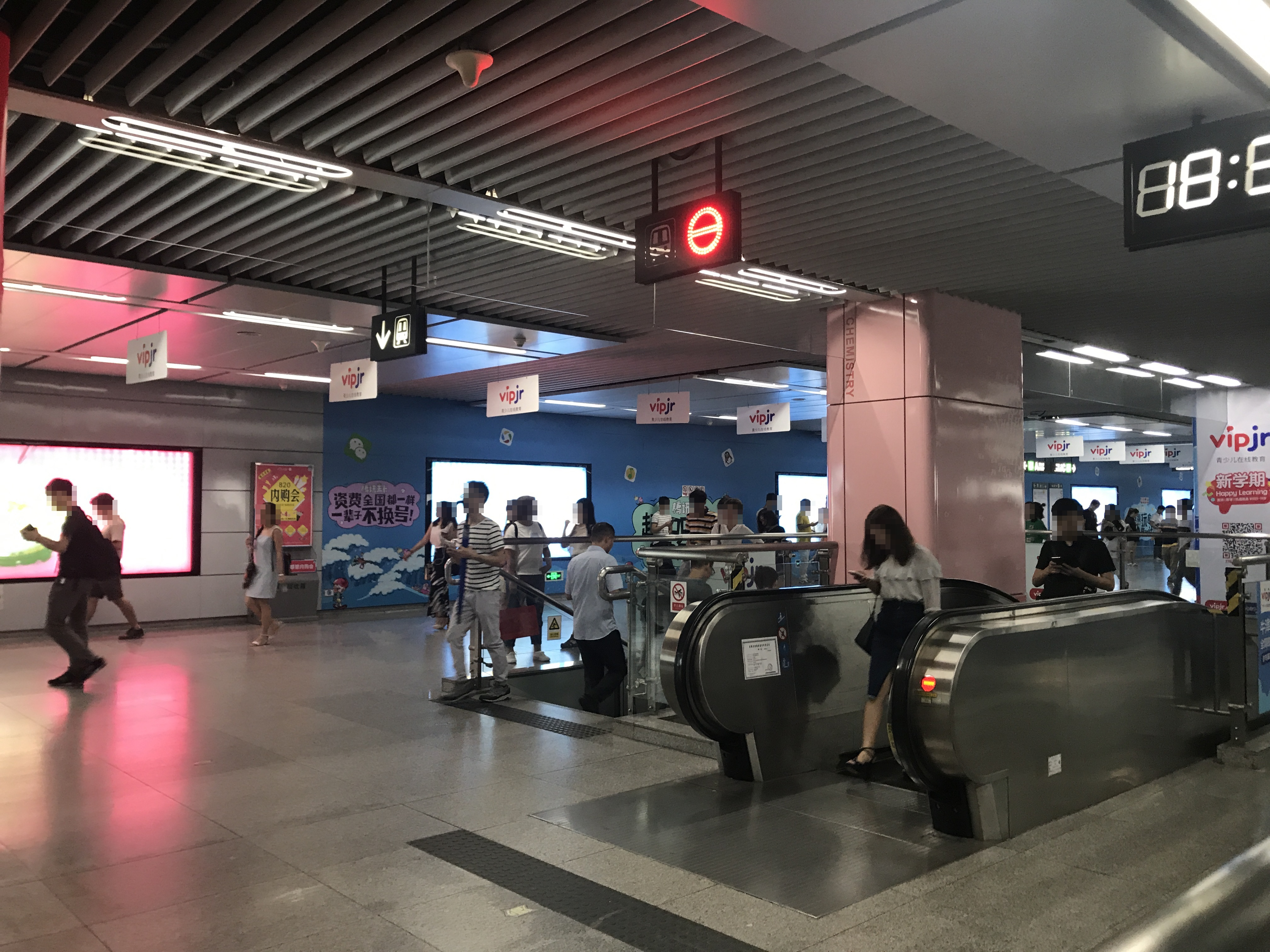 深大駅構内